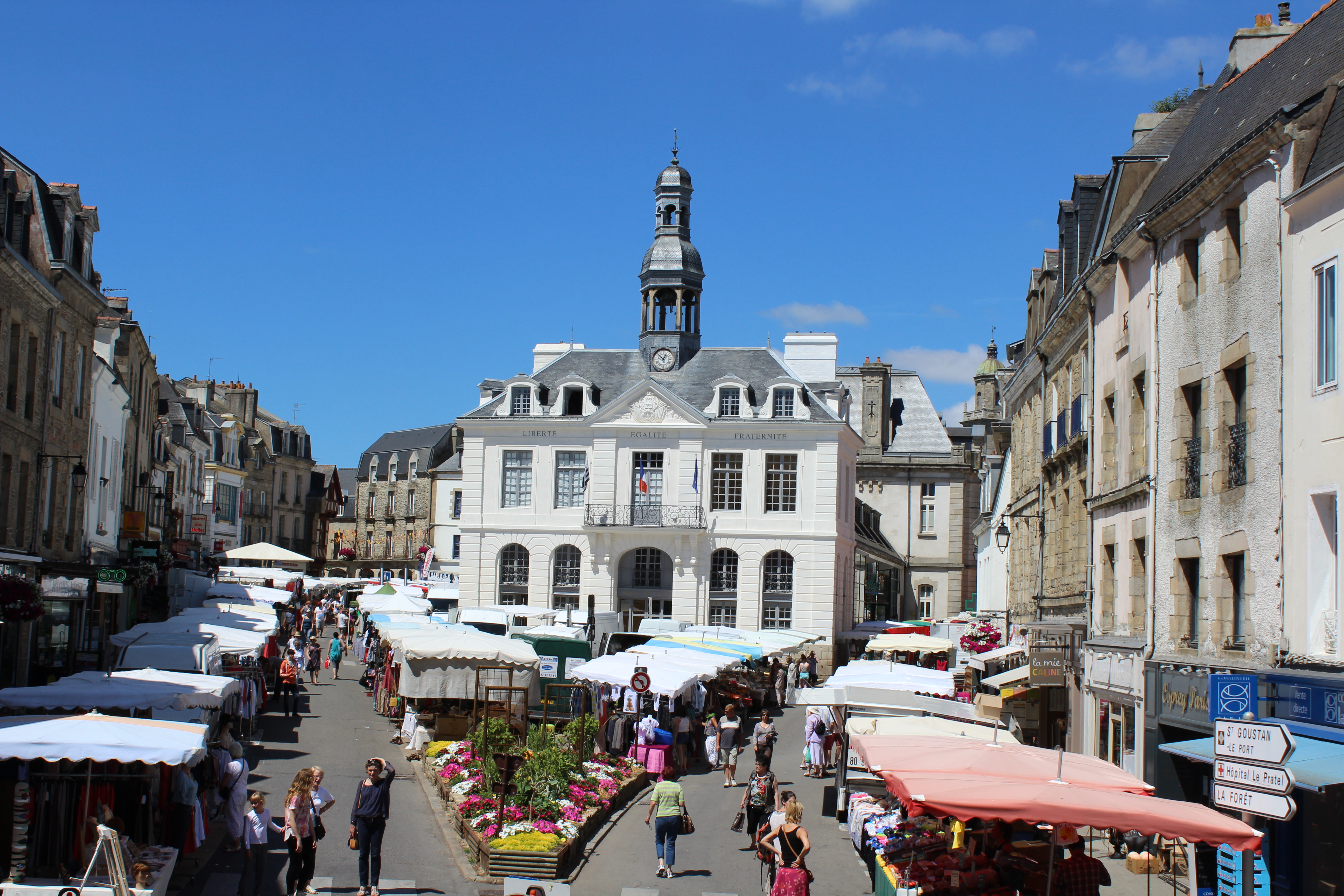 Lundi, jour de marché, place de la République à Auray (Morbihan, France).